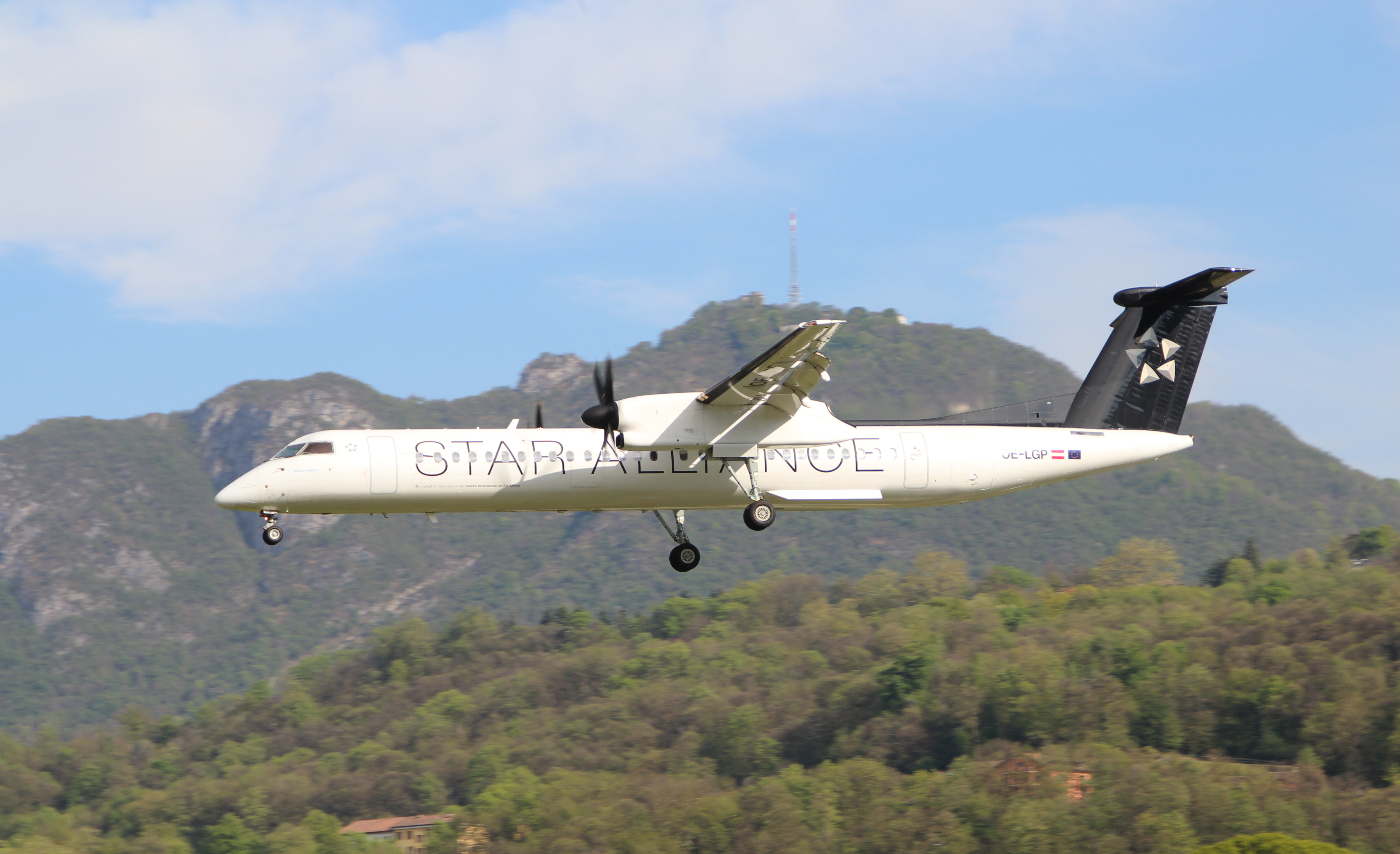 Star Alliance-Maschine im Anflug auf den Flughafen Agno TI